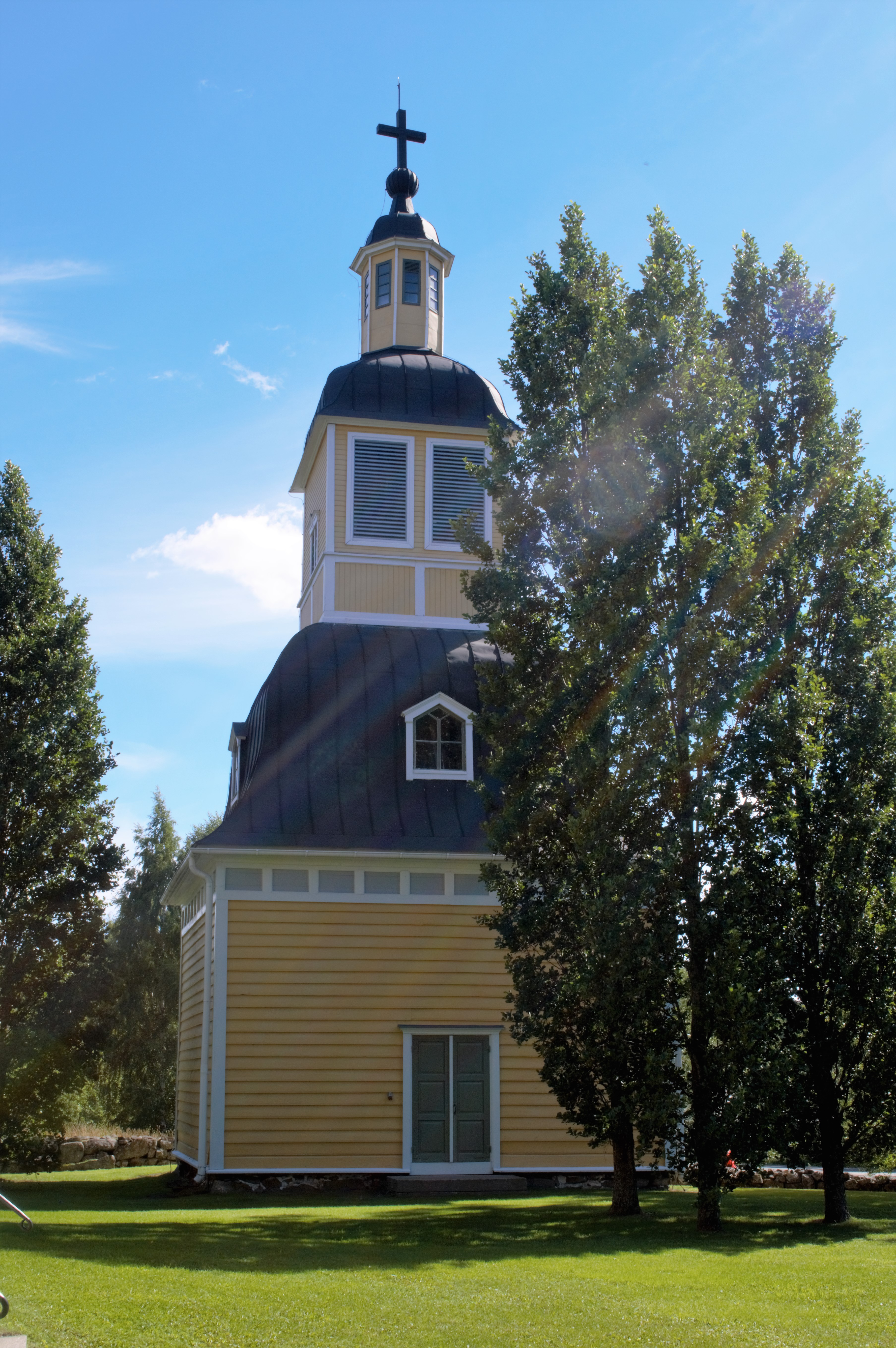 Taipalsaaren kirkon kellotapuli